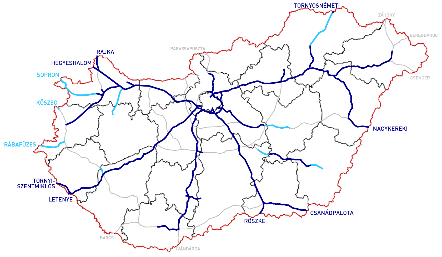 Magyarország autópályái 2020.07.20.